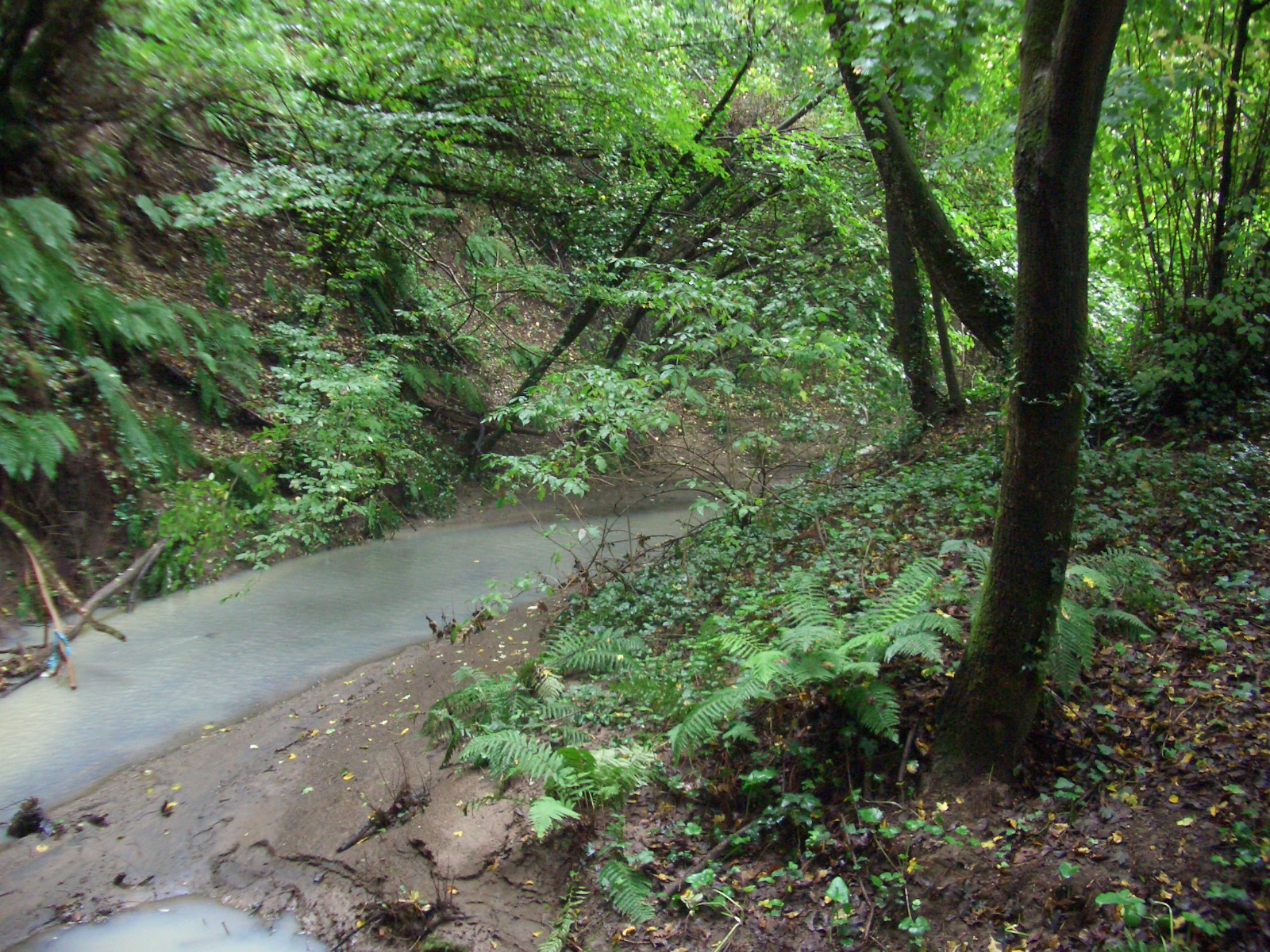 Formello (RM) - Giovanni Garofoli - esplorazione opere idrauliche etrusche